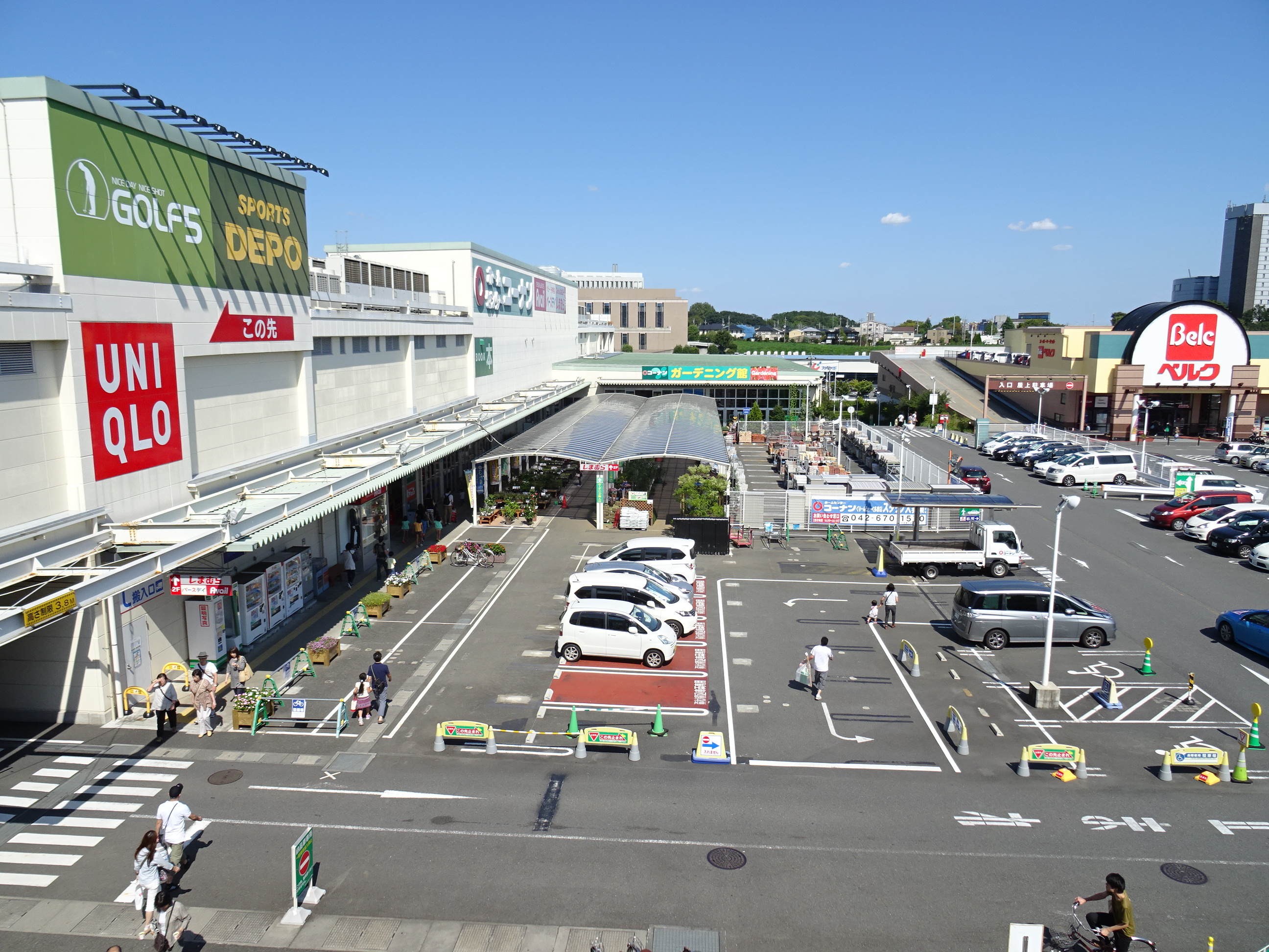 多摩ニュータウンにある複合商業施設「ぐりーんうぉーく多摩」（2015/09/20撮影）